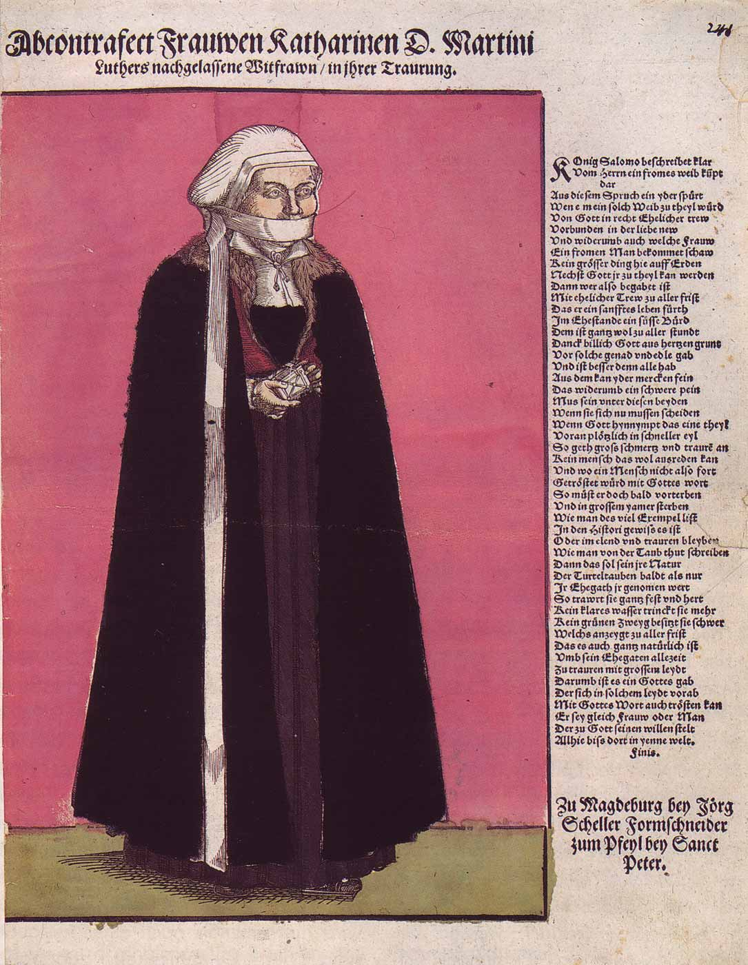 Katharina von Bora in Witwentracht, kolorierter Holzschnitt